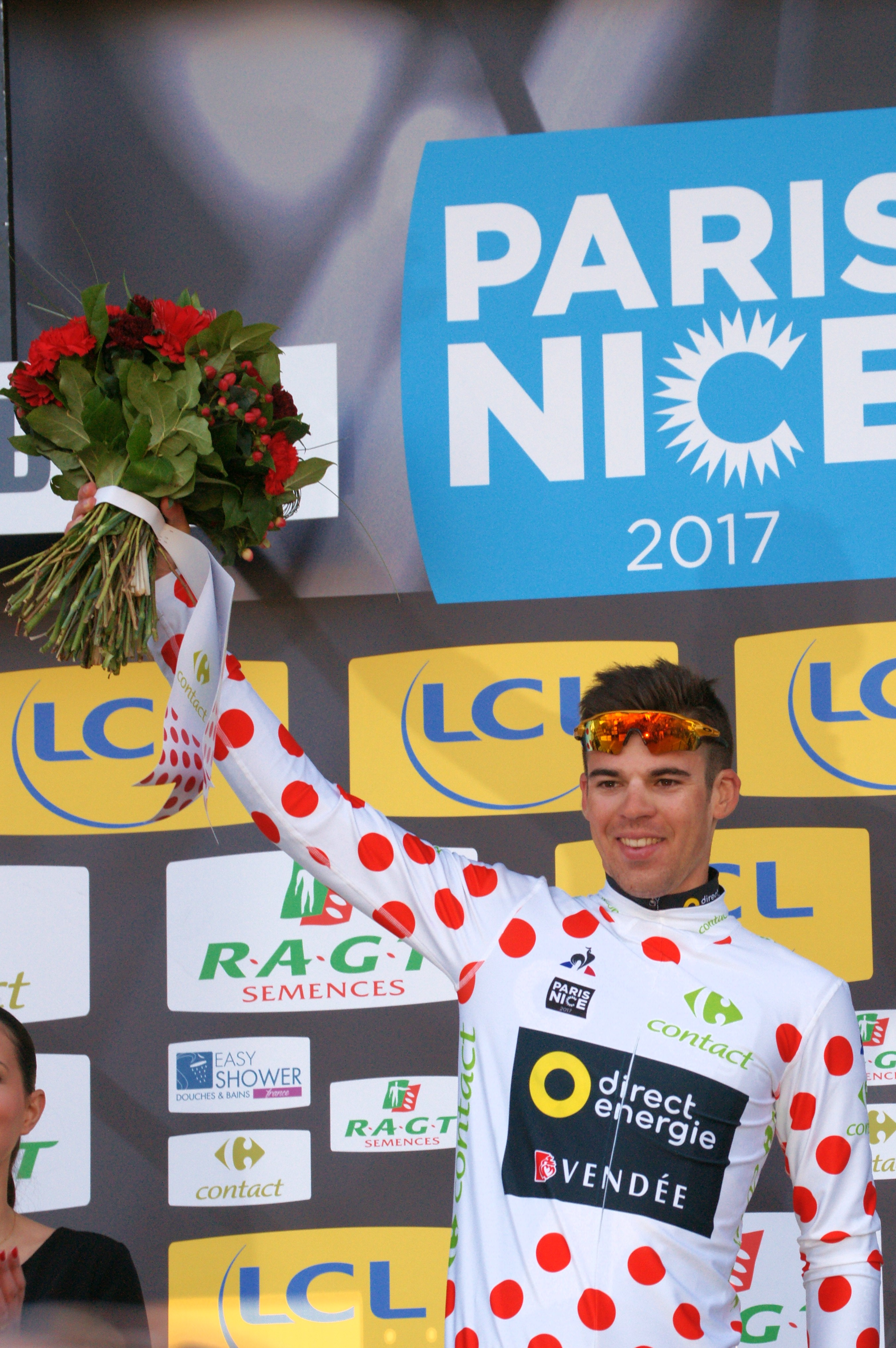 Lilian Calmejane pois Roubion Paris-Nice 2017